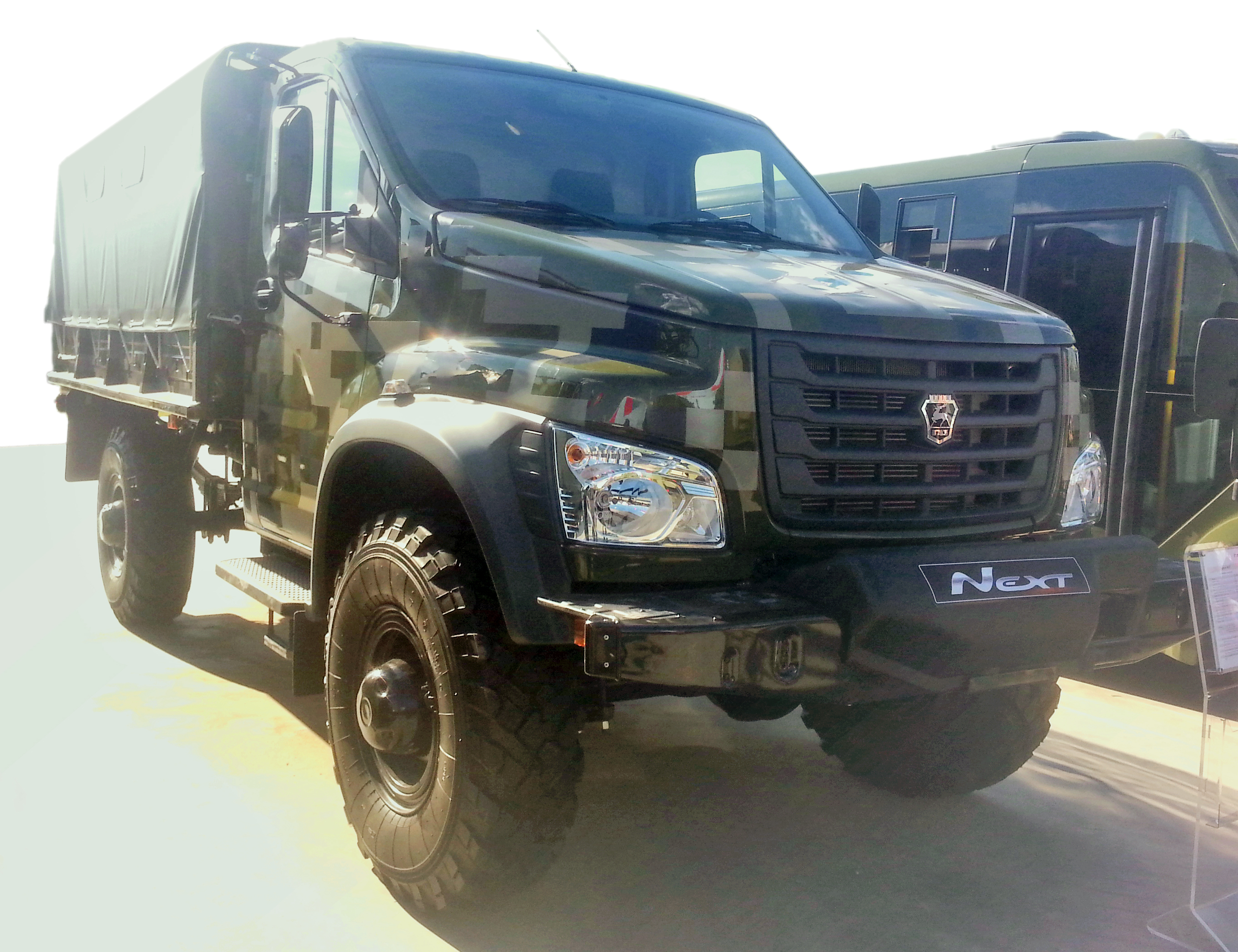 Армейский Садко NEXT на выставке «Армия 2015»